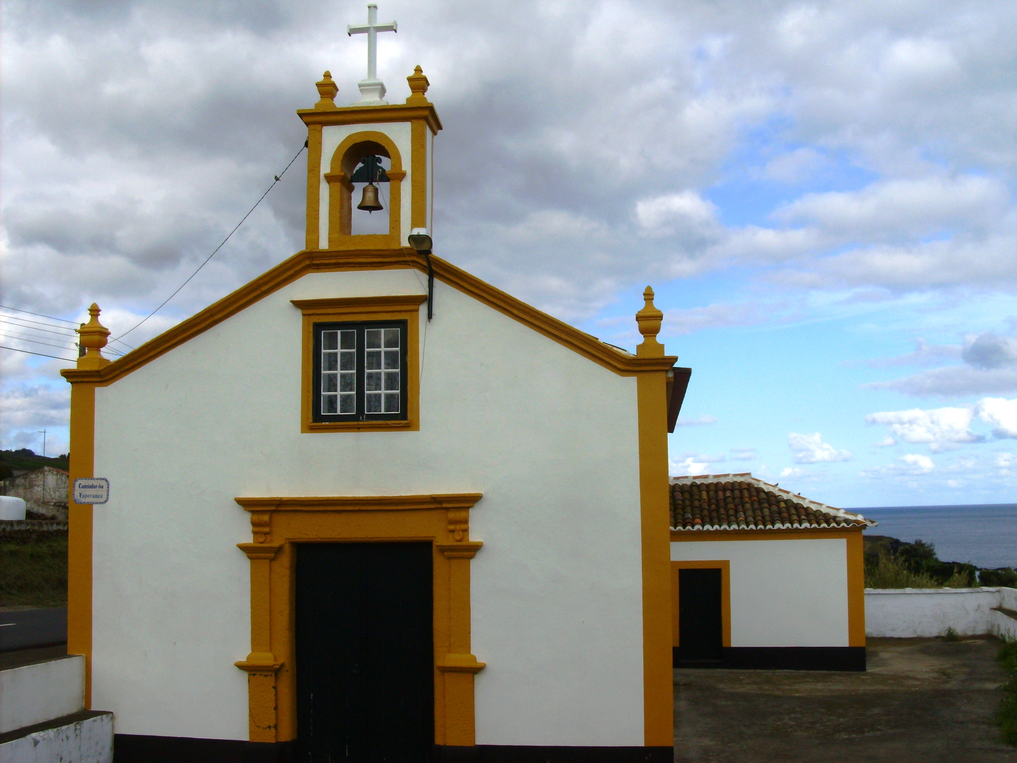 Ermida de Nossa Senhora da Esperança, lugar da Serretinha, freguesia de Porto Judeu, concelho de Angra do Heroísmo, ilha Terceira, Açores.